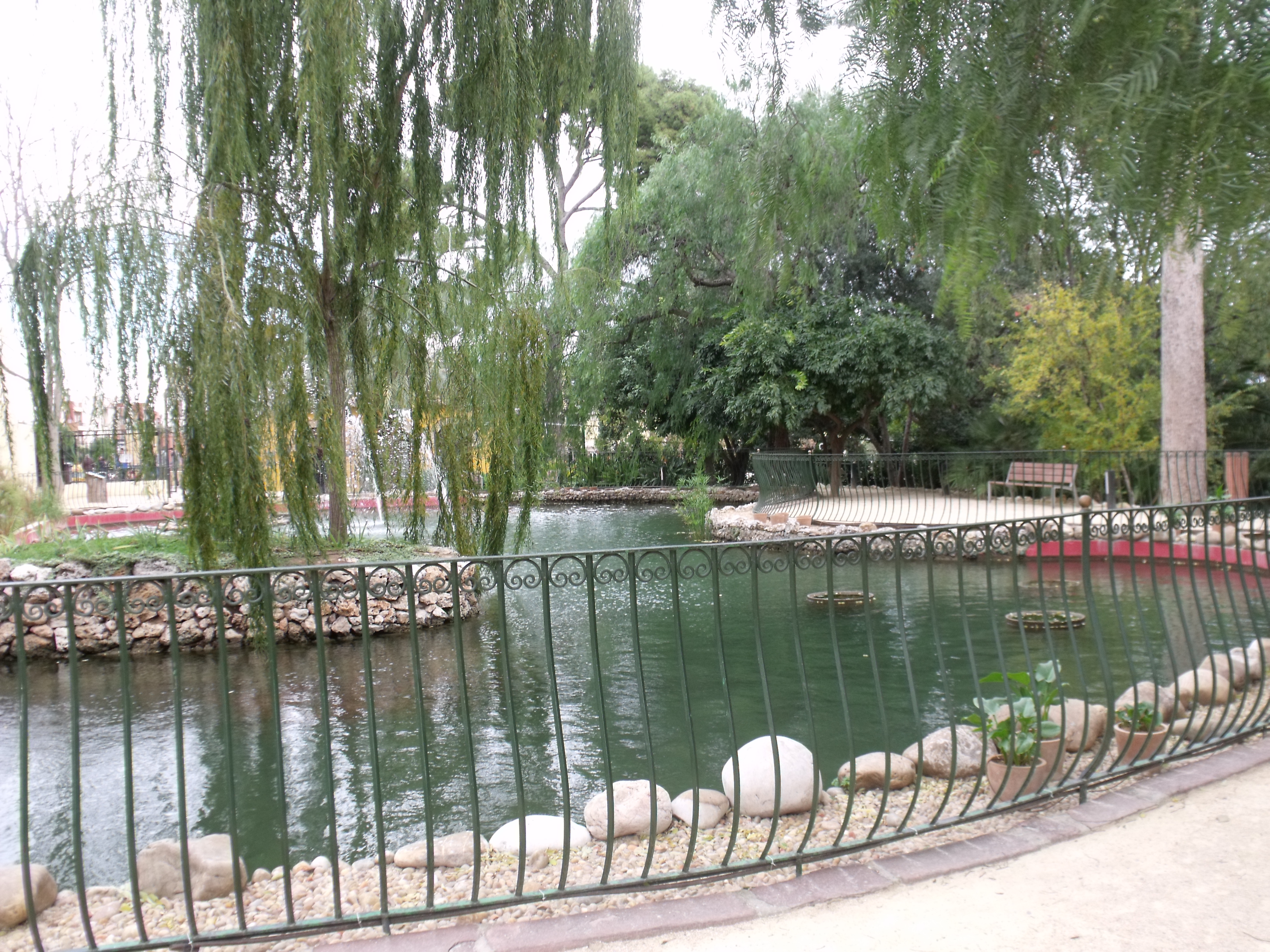 Huerto de Trenor. Torrent, España.